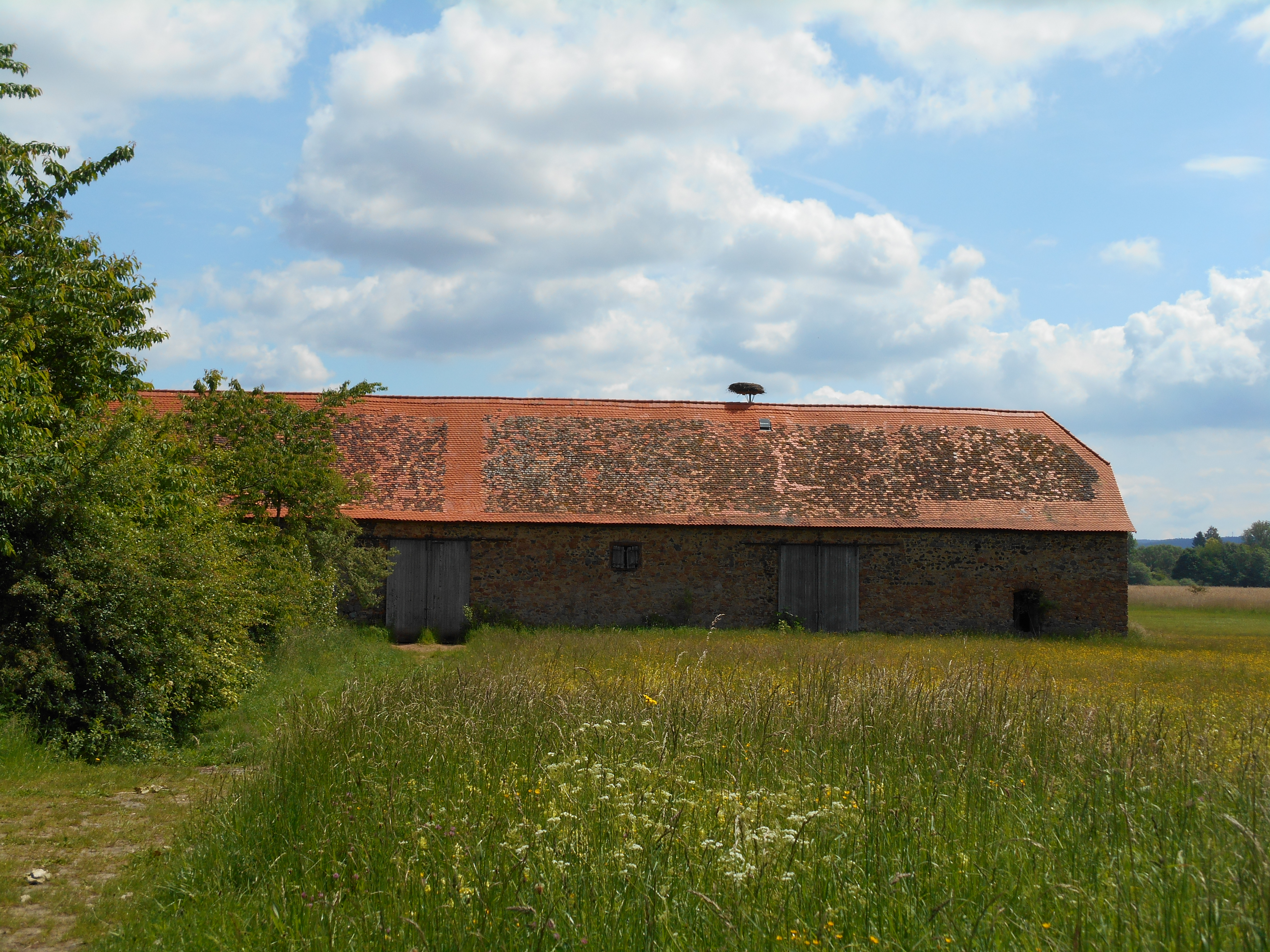 Teichscheune im Naturschutzgebiet Reinheimer Teich. Hier wurde früher Heu für die Pferde der großherzoglichen Dragoner in Darmstadt gelagert.